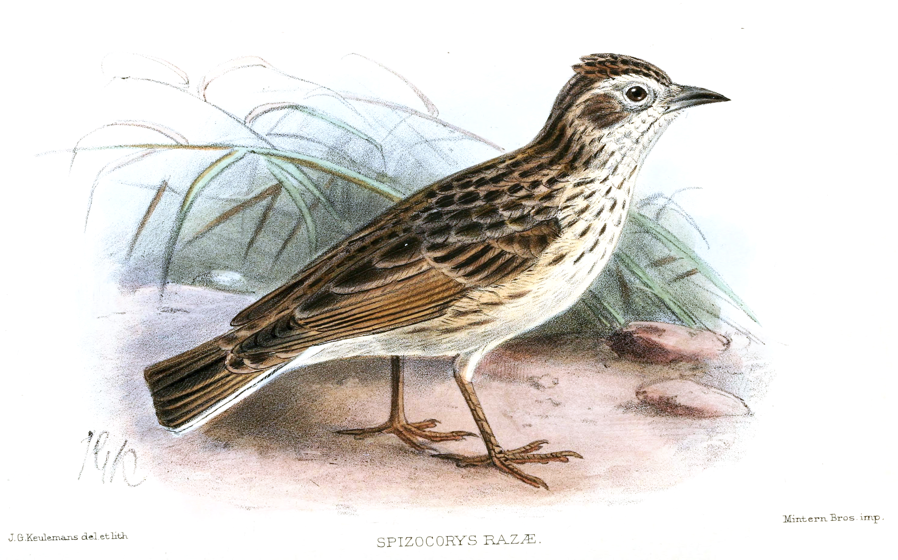 Spizocorys razae=Alauda razae